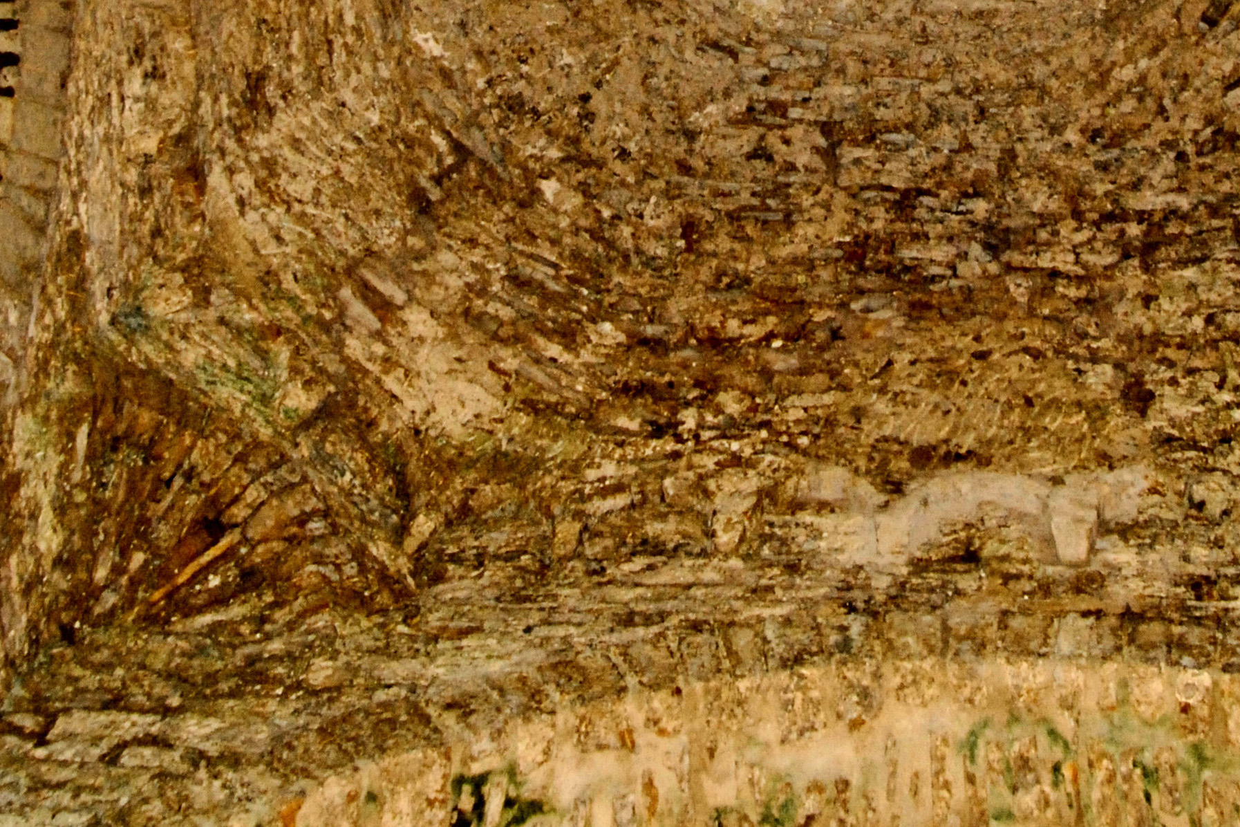 Saint-Hymetière, Detail Trompe, Tambour mit Blendarkaden- Fries